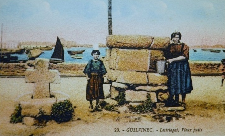 Croix et vieux puits devant le port de Lestriagat (Léchiagat) et bretonnes en tenue bigoudène ; à l'arrière-plan le port du Guilvinec.